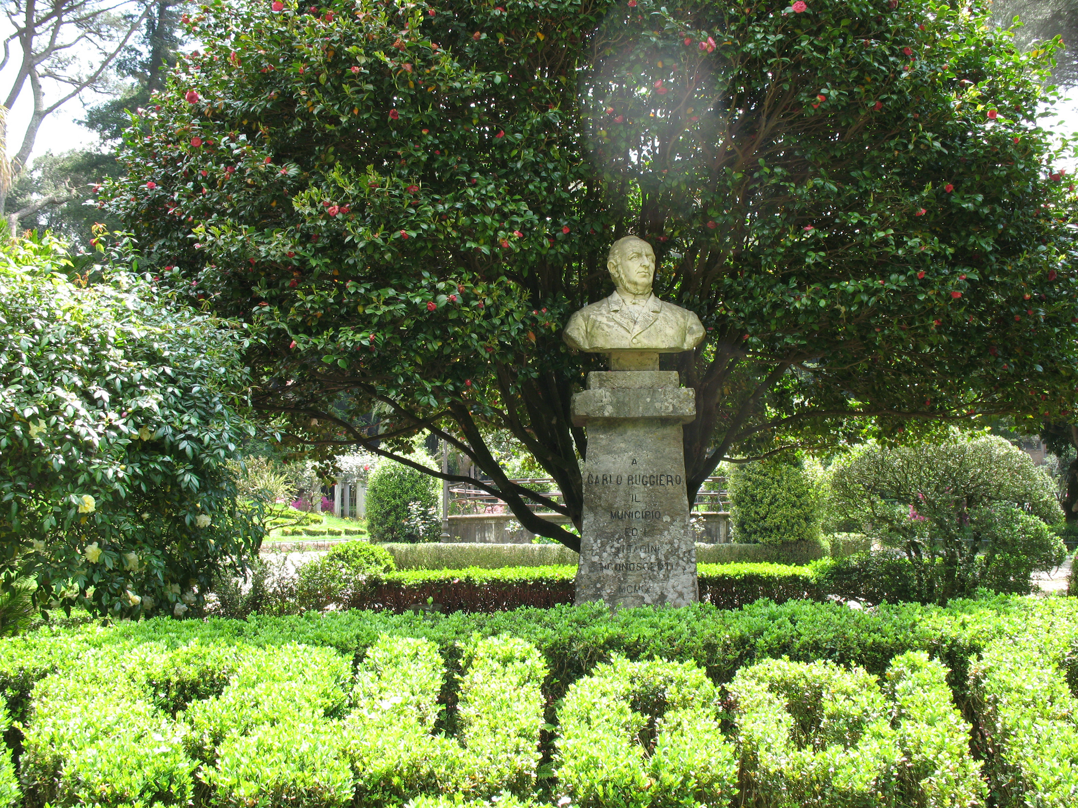 Foto della villa comunale di Cittanova (RC), Italy